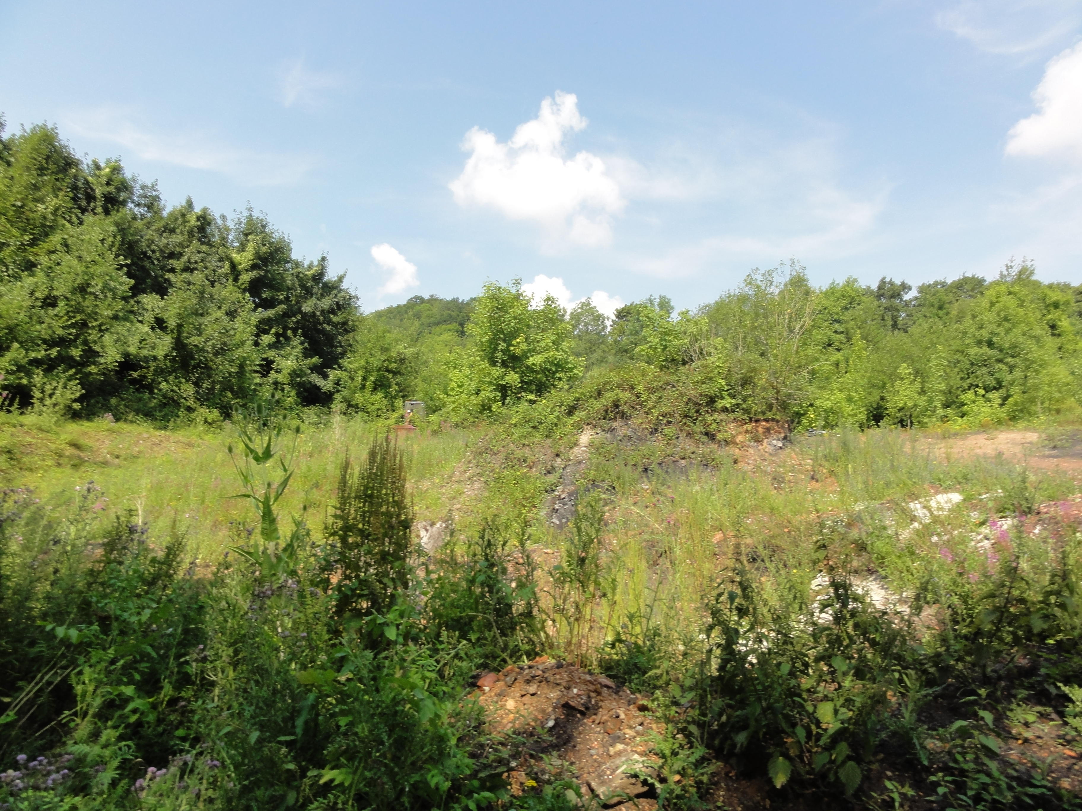 Terril n° 245 dit Fléchinelle Est, fosse n° 1 - 1 bis de la Compagnie des mines de Ligny-lès-Aire dans le bassin minier du Nord-Pas-de-Calais, Enquin-les-Mines, Pas-de-Calais, Nord-Pas-de-Calais, France.